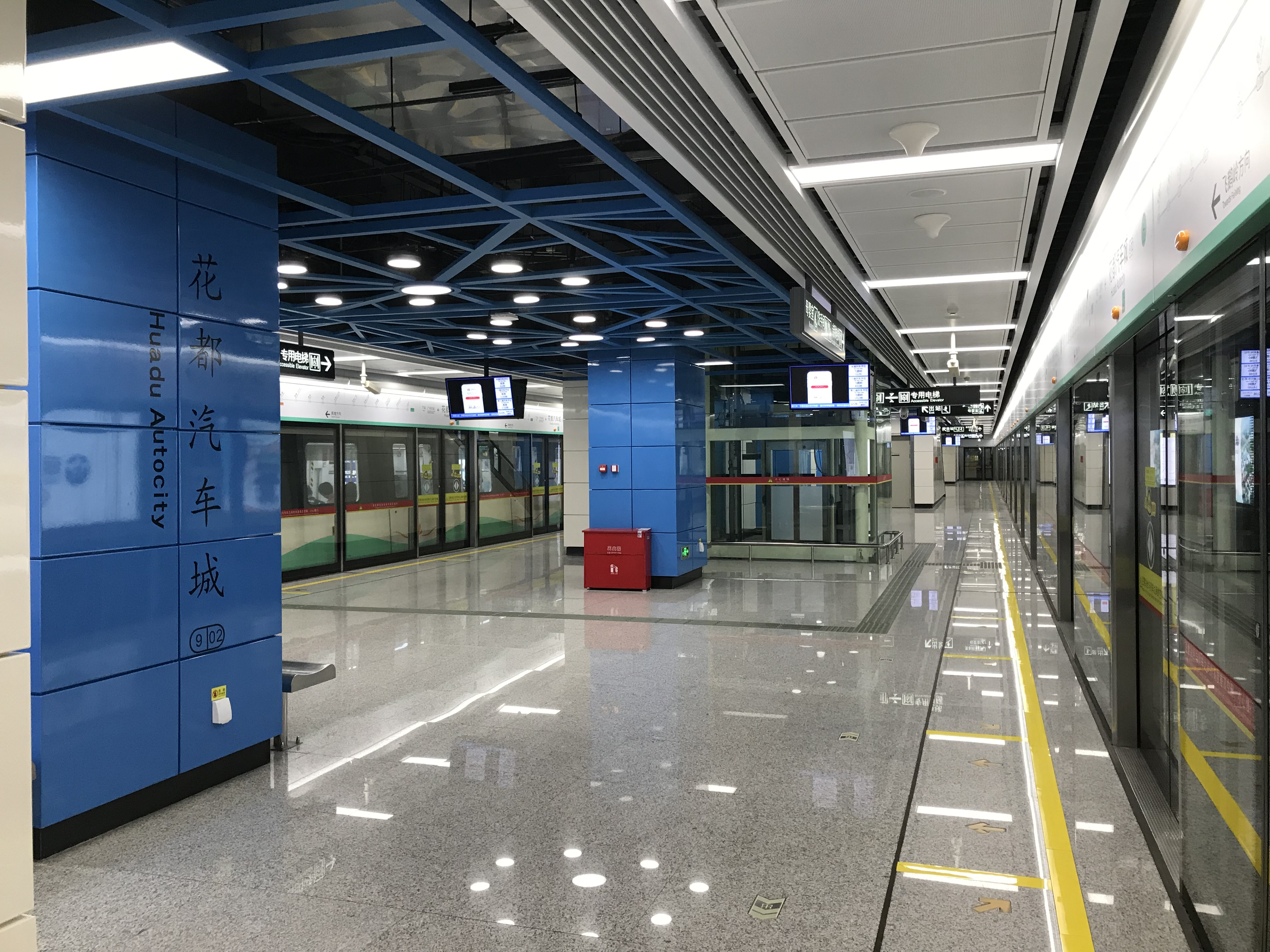 广州地铁花都汽车城站